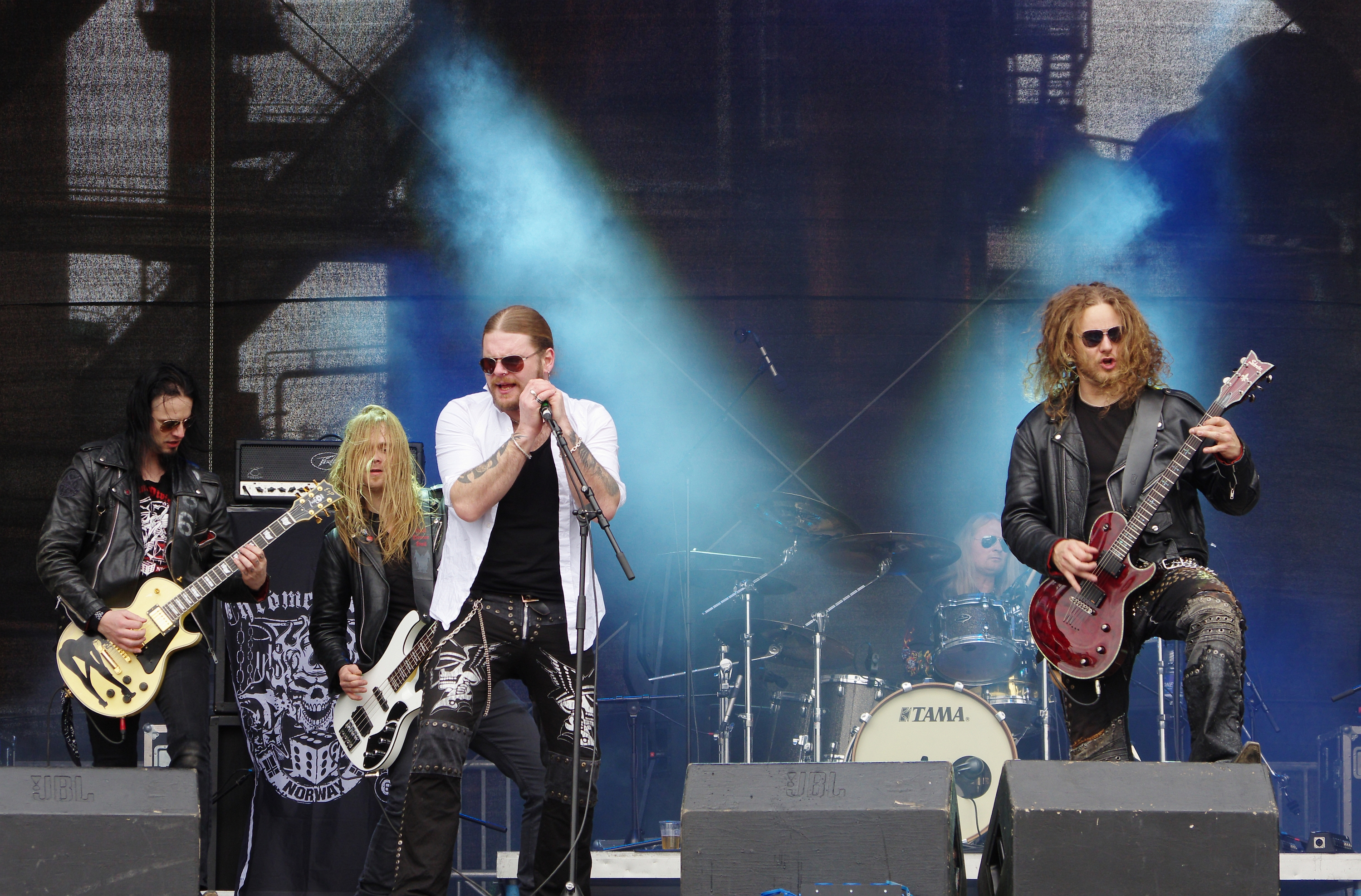 Chrome Division, Metal-Band um Stian Tomt Thoresen (aka Shagrath), Auftritt bei Rock in den Ruinen 2013 in Dortmund.